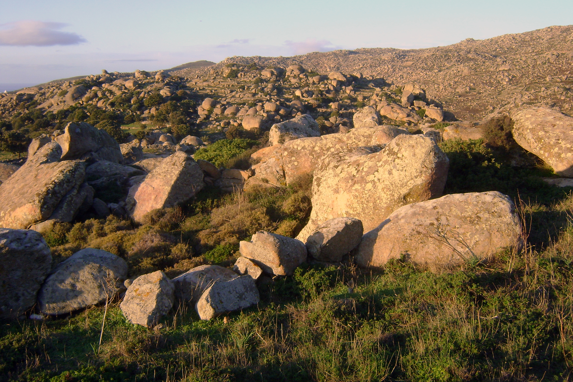 Bράχια στη περιοχή της Bωλάξ. Nήσος Tήνος, Eλλάδα.